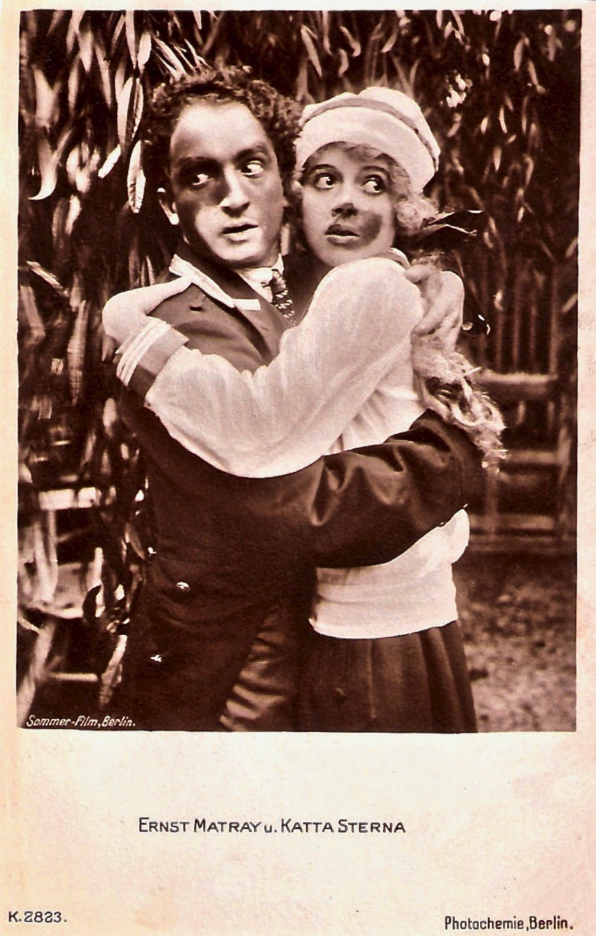 Der österreichisch-ungarische Tänzer, Choreograph, Schauspieler und Filmregisseur Ernst Mátray (1891–1978) mit Katharina Stern (1897–1984), Künstlername Katta Sterna, deutsche Tänzerin und Filmdarstellerin.